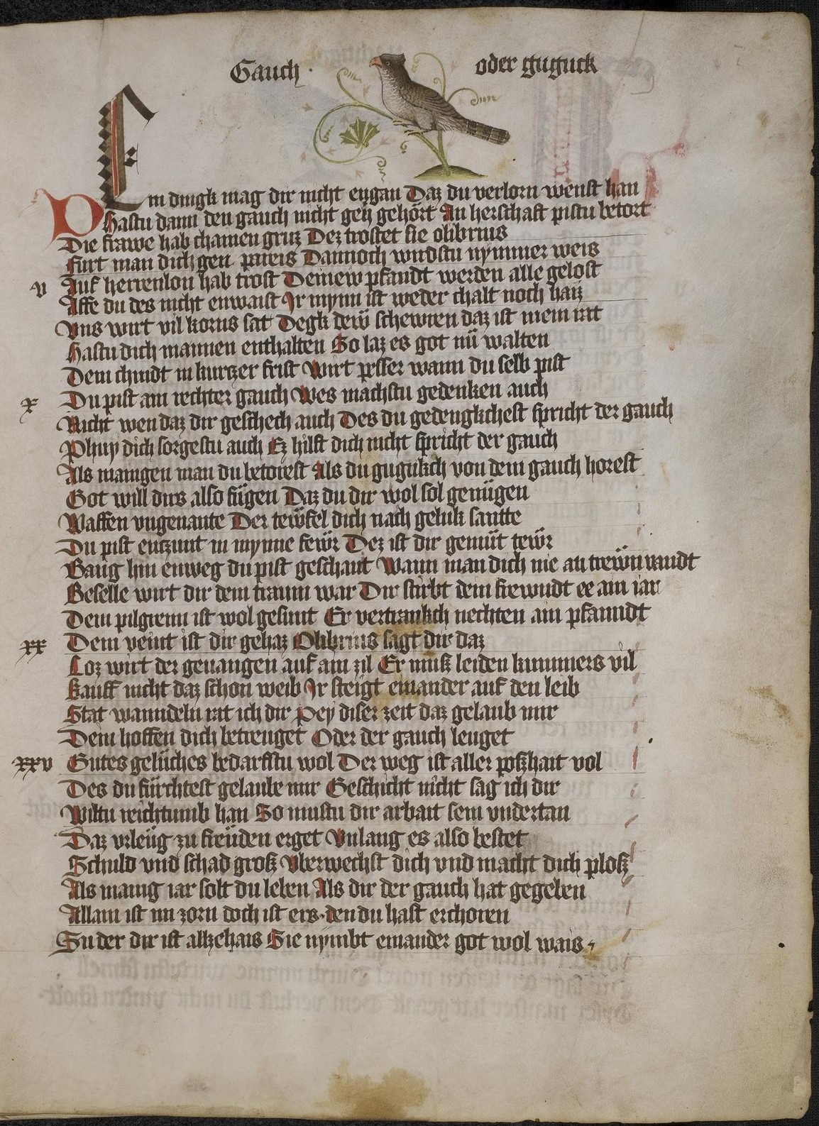 Codex Palatinus germanicus 7, Blatt 7r der Handschrift: Wahrsagebuch, Reimpaarzeilen, über dem Text: Vogelbild Kuckuck